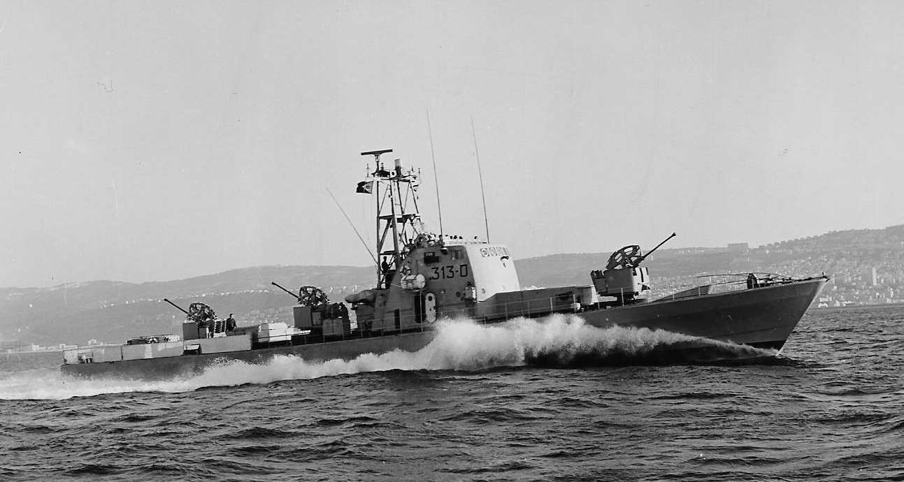 אח"י מזנק סער 1